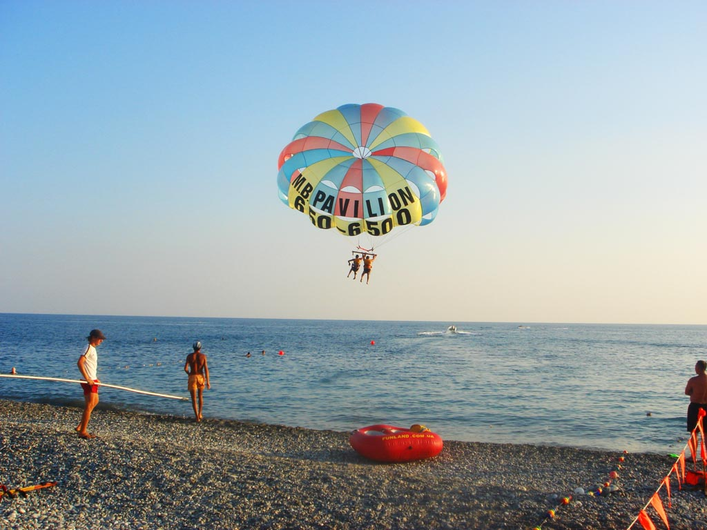 Дагомыс - катание на парашюте